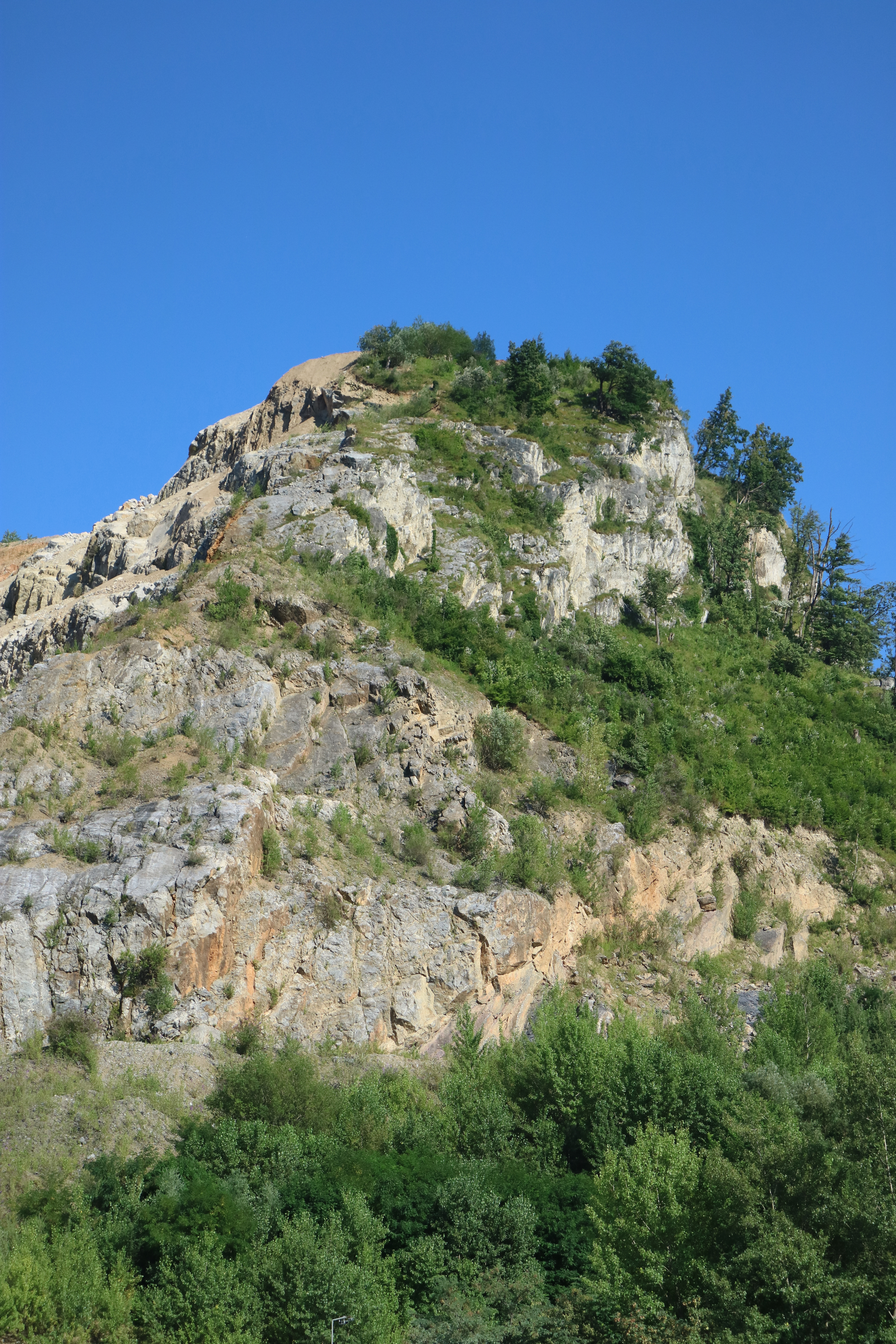 Gipfel des Kanzelkogels in der Gemeinde Gratkorn, Steiermark